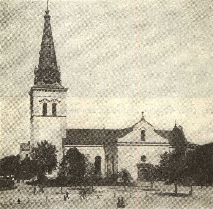 Karlstads domkyrka Cropped version of Image:Karlstad.jpg Originally from